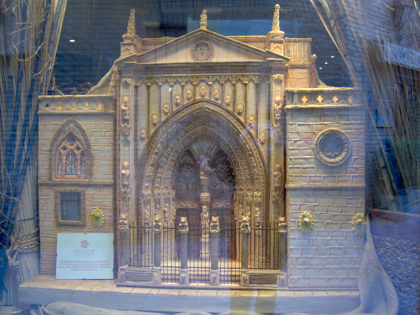 Replica hecha de mazapán de la Puerta de los Leones de la Catedral de Toledo (España), expuesta en una pastelería de Toledo.